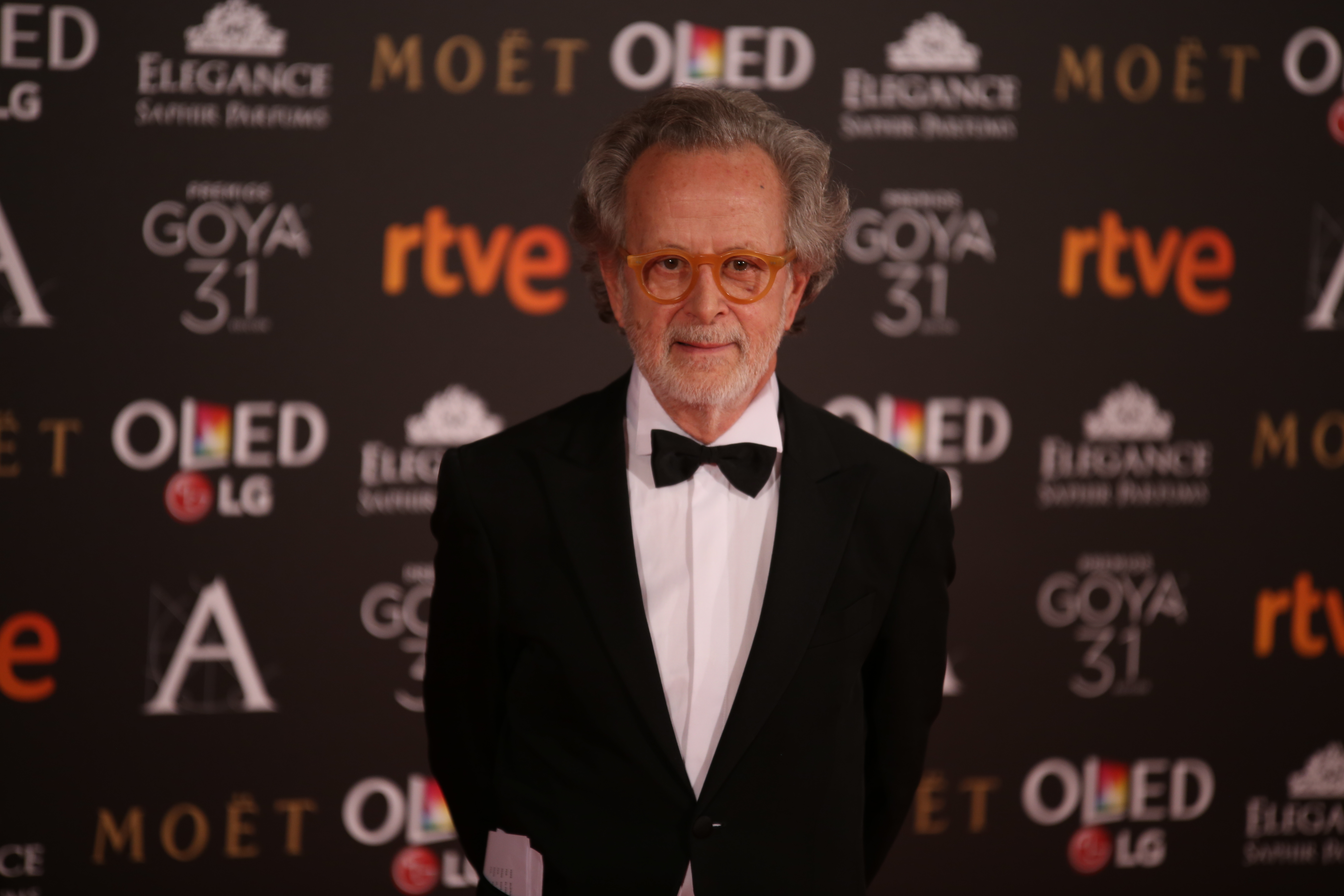 Premios Goya 2017